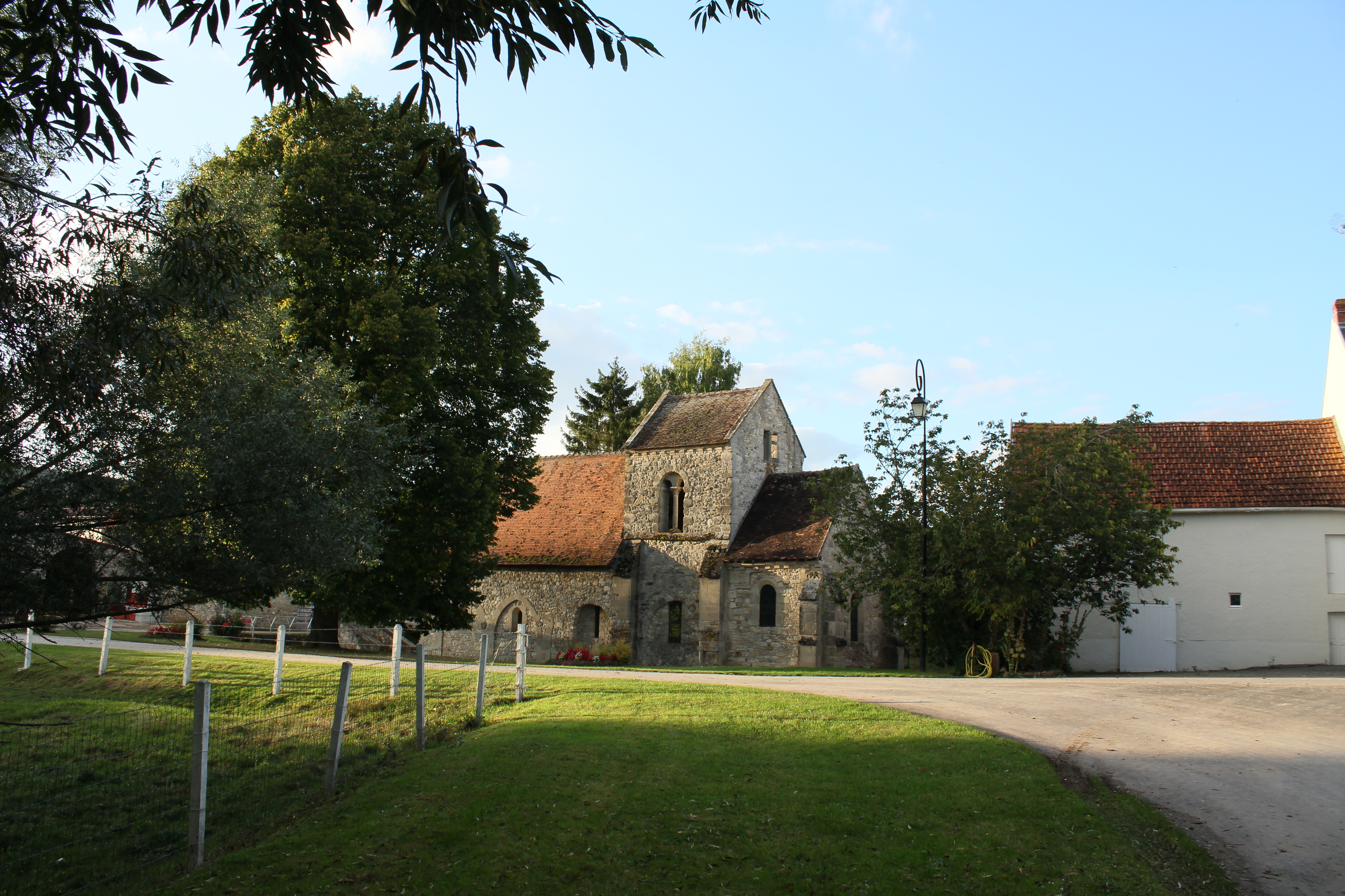 Église Saint-Martin de Jonquery, (Classé, 1919) .